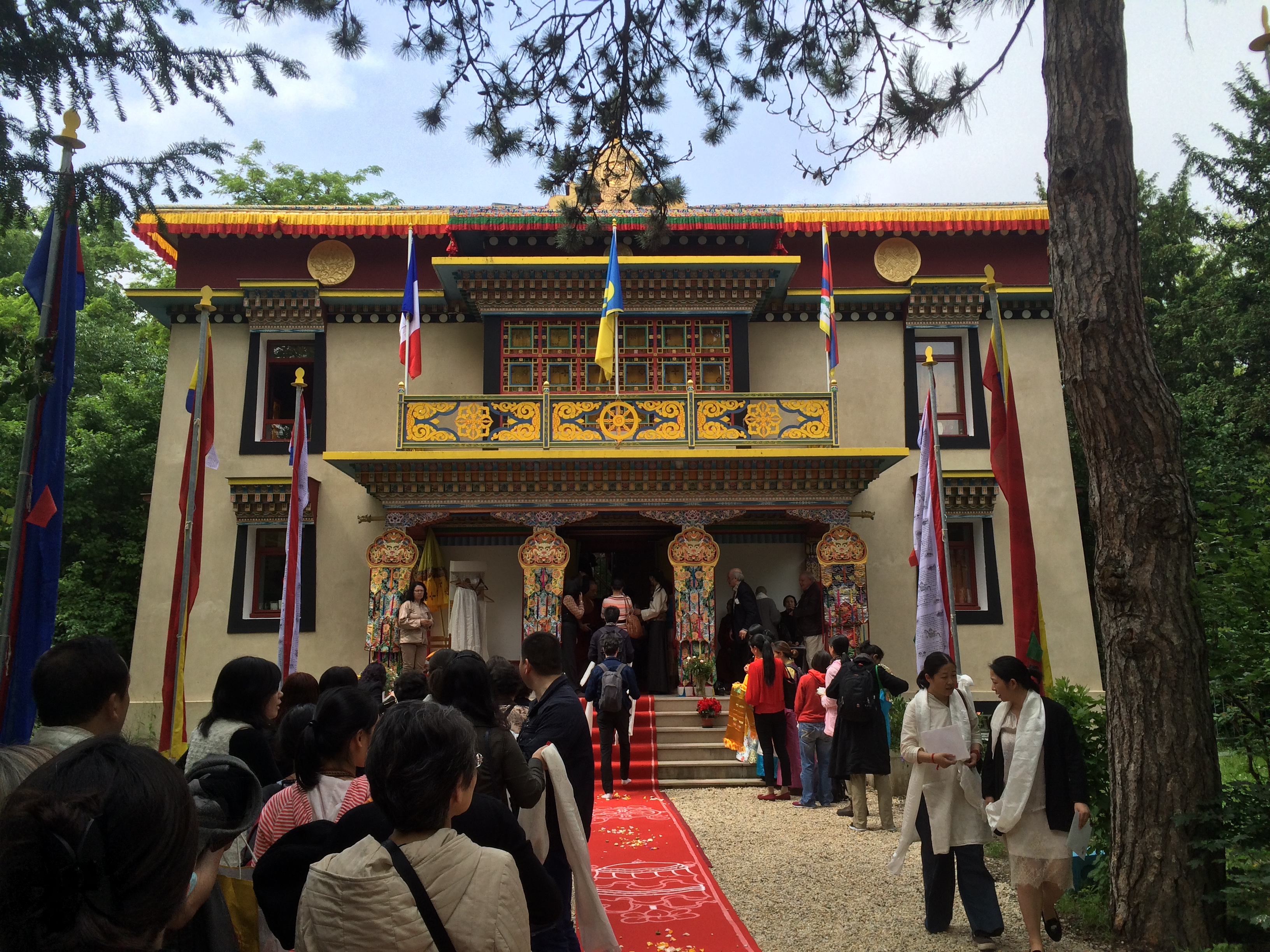 Centre Kagyu Dzong en France, près de Paris, dans le bois de Vincennes